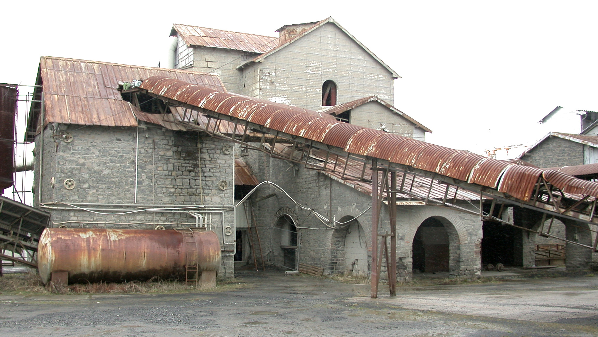 Tertiär- und Industrie-Erlebnispark Stöffel, Rückfront Hauptgebäude